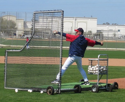 Coach Joe Vavra